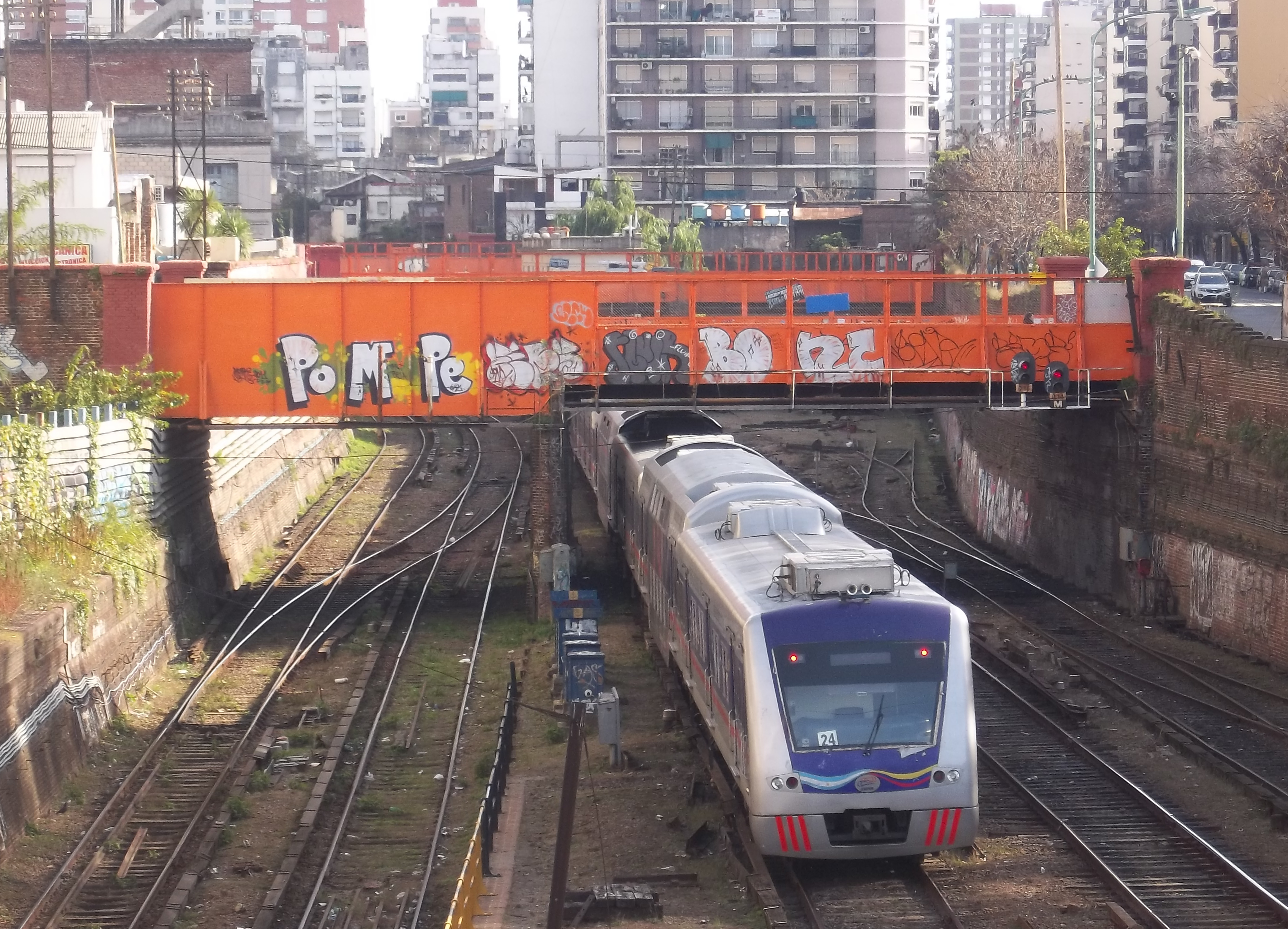 Formación ingresando a la trinchera Once - Caballito desde el puente peatonal de la calle Sánchez de Bustamante, en la ciudad de Buenos Aires, Argentina.